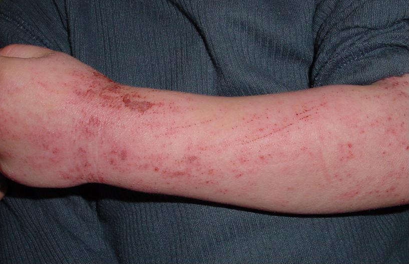 Neurodermitis am Arm eines 5-jährigen Kindes; Eisfelder, 12-2004, GNU FDL